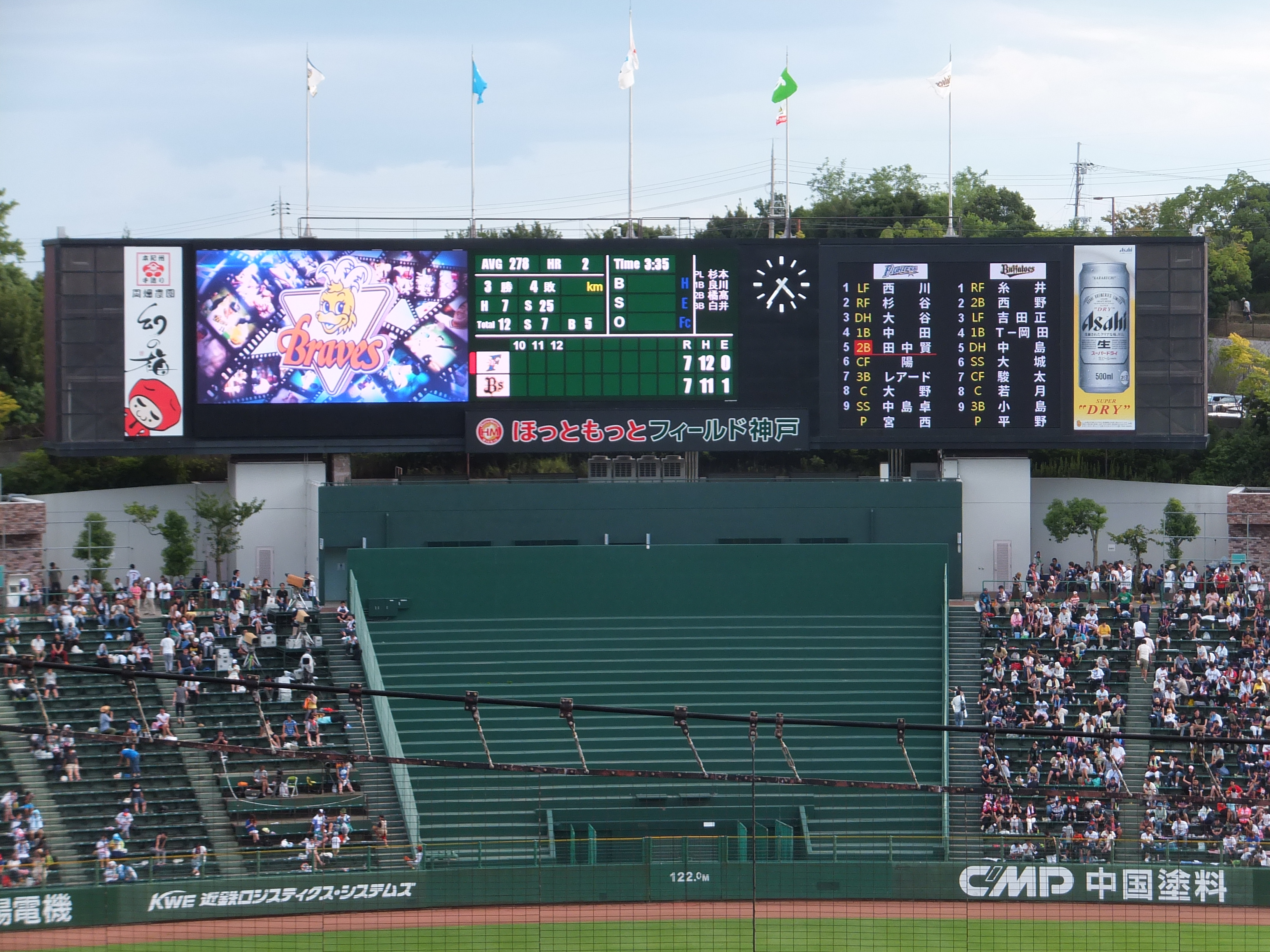 ほっともっとフィールド神戸のバックスクリーンスコアボード。得点、成績等の箇所は2015年中盤から背景が緑地に変更されている。2016年9月4日、オリックス・ブレーブス復刻試合にて。